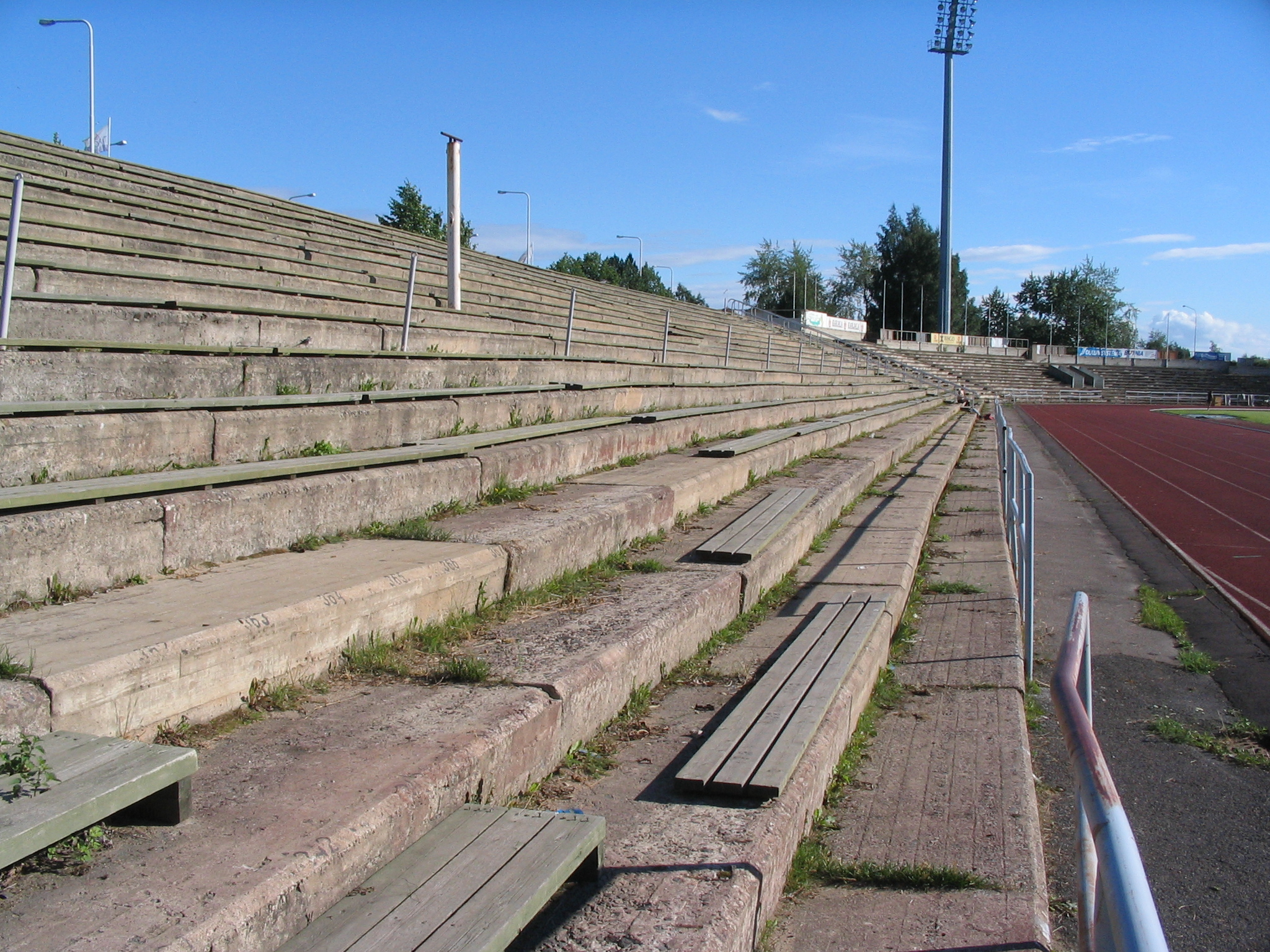 Raatin stadion, vanha aurinkokatsomo 26.7.2005